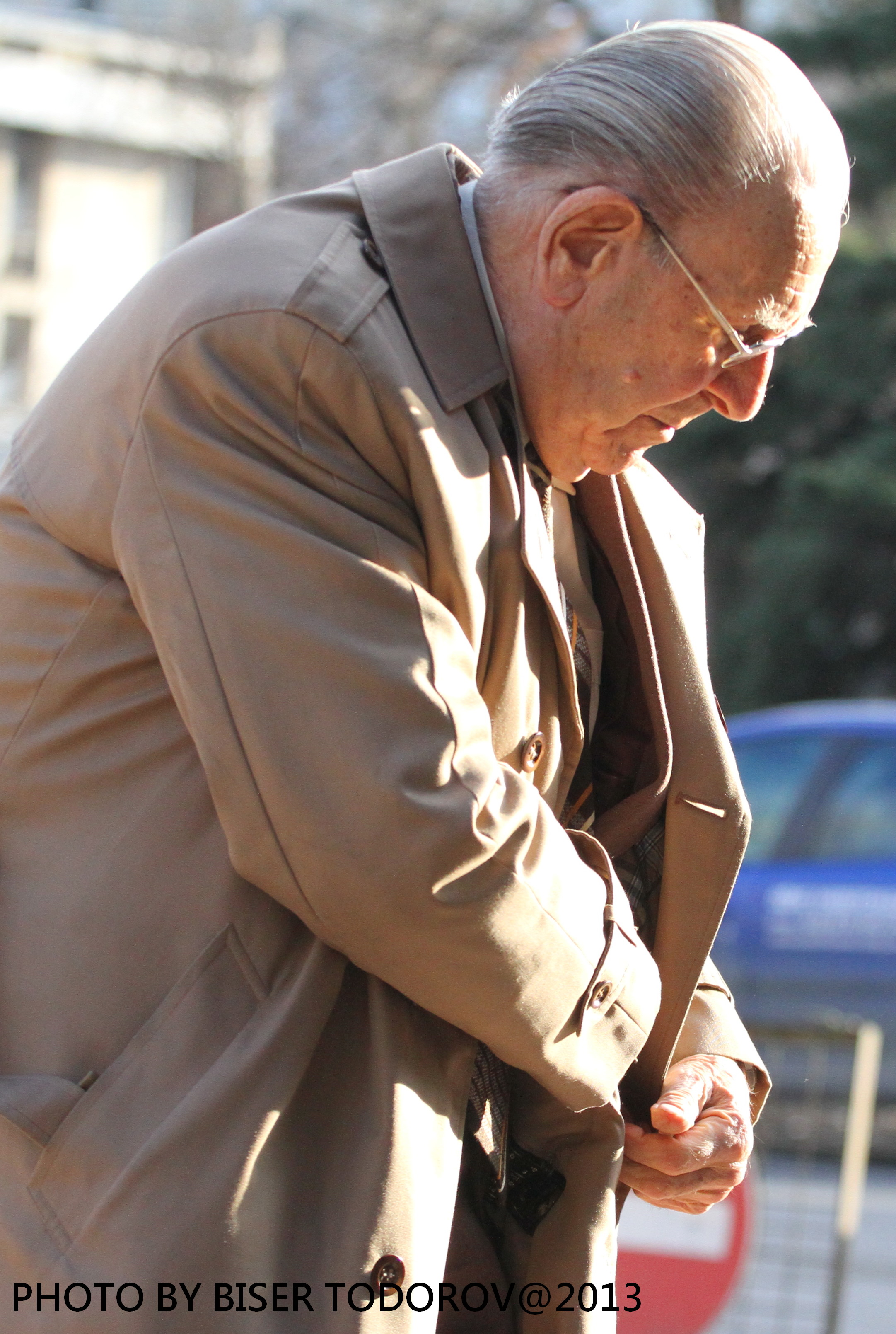 Тодор Александров - бивш български боксьор и треньор по бокс